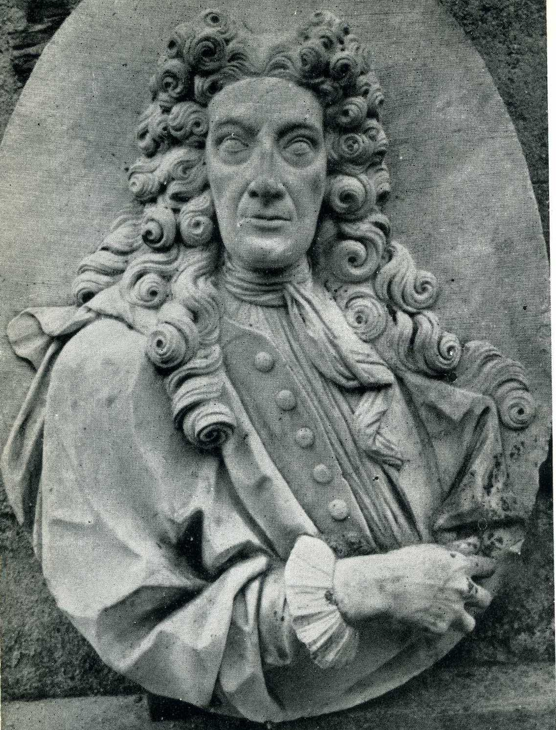 Messina, Ritratto di Giovanni Impellizzeri, di Ignazio Buceti.